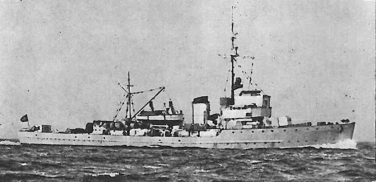 Niemiecki trałowiec M-1 typu Minensuchboot 1935.